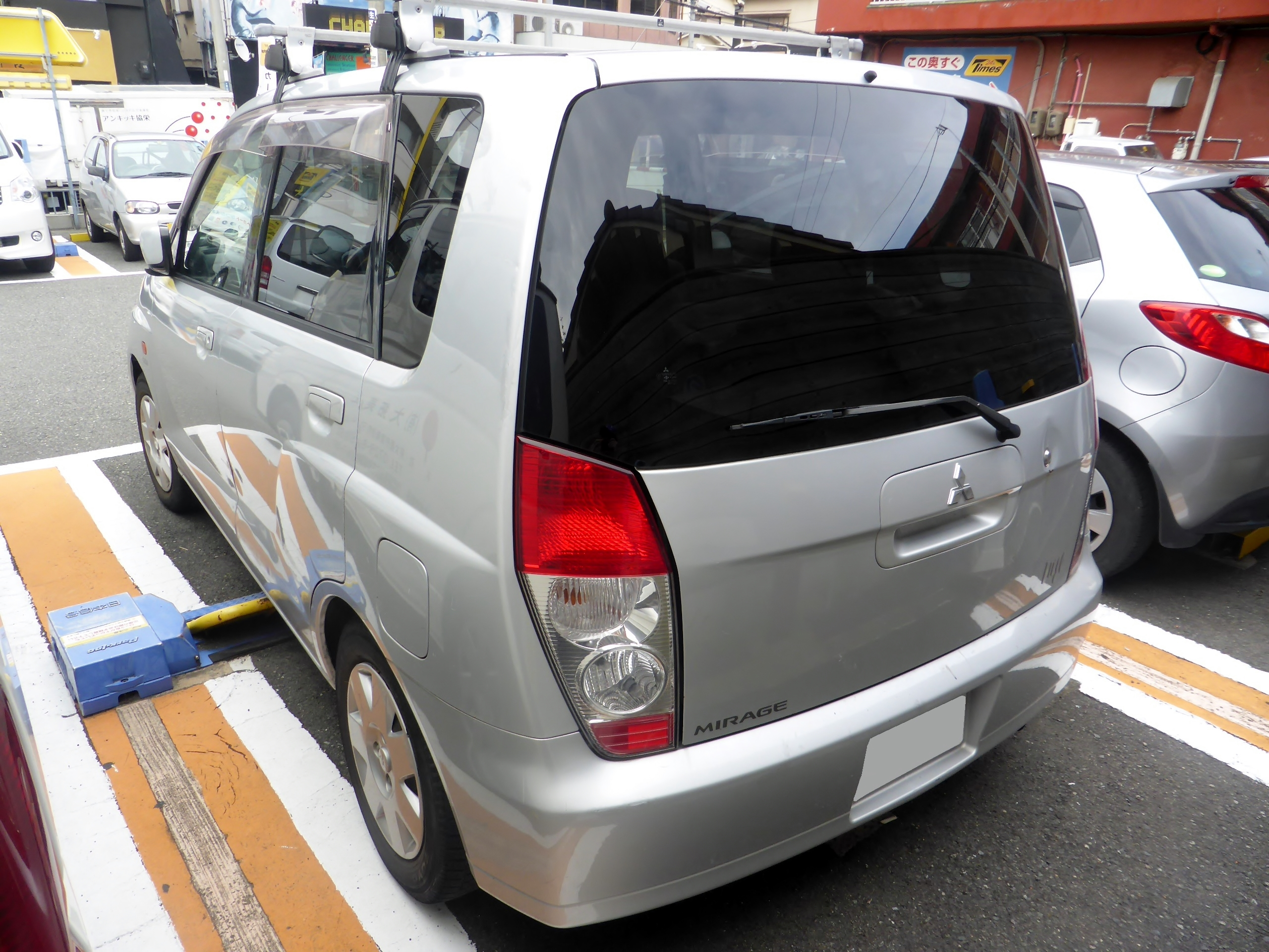 CQ2A型三菱・ミラージュディンゴVをリアから撮影。